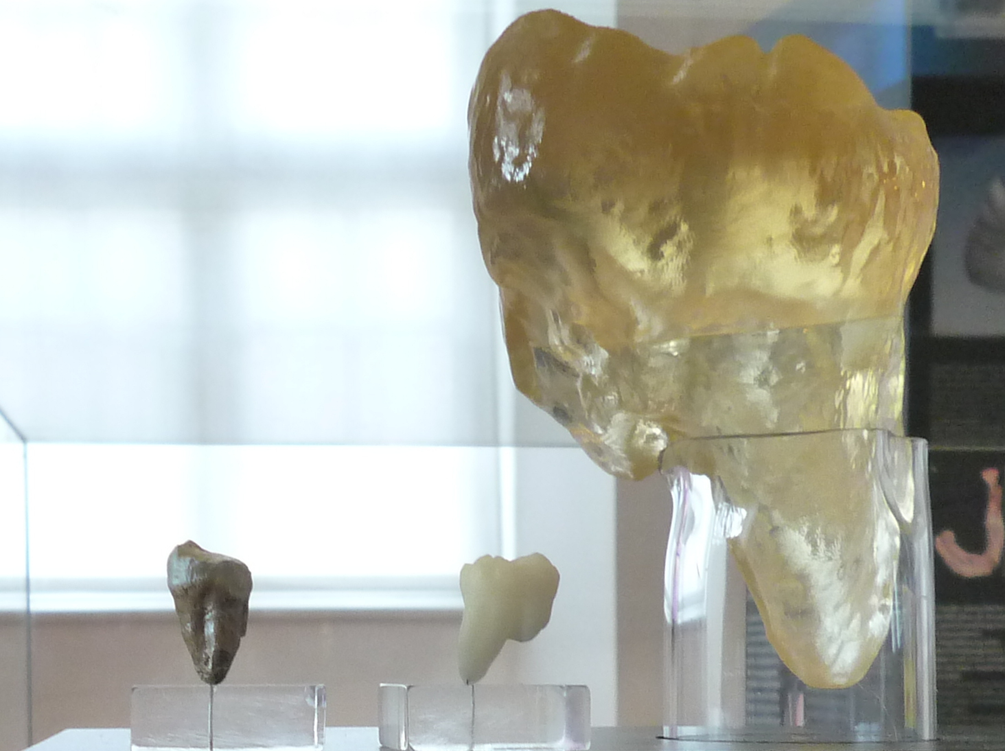 Unterer Backenzahn eines Australopithecus in Originalgröße: Abguss (links), Stereolithografie (Mitte) und transparentes Modell in 5-facher Vergrößerung. Oberflächenrelief der abgenutzten Kaufläche und Zahnhöhle im Inneren sind sichtbar.